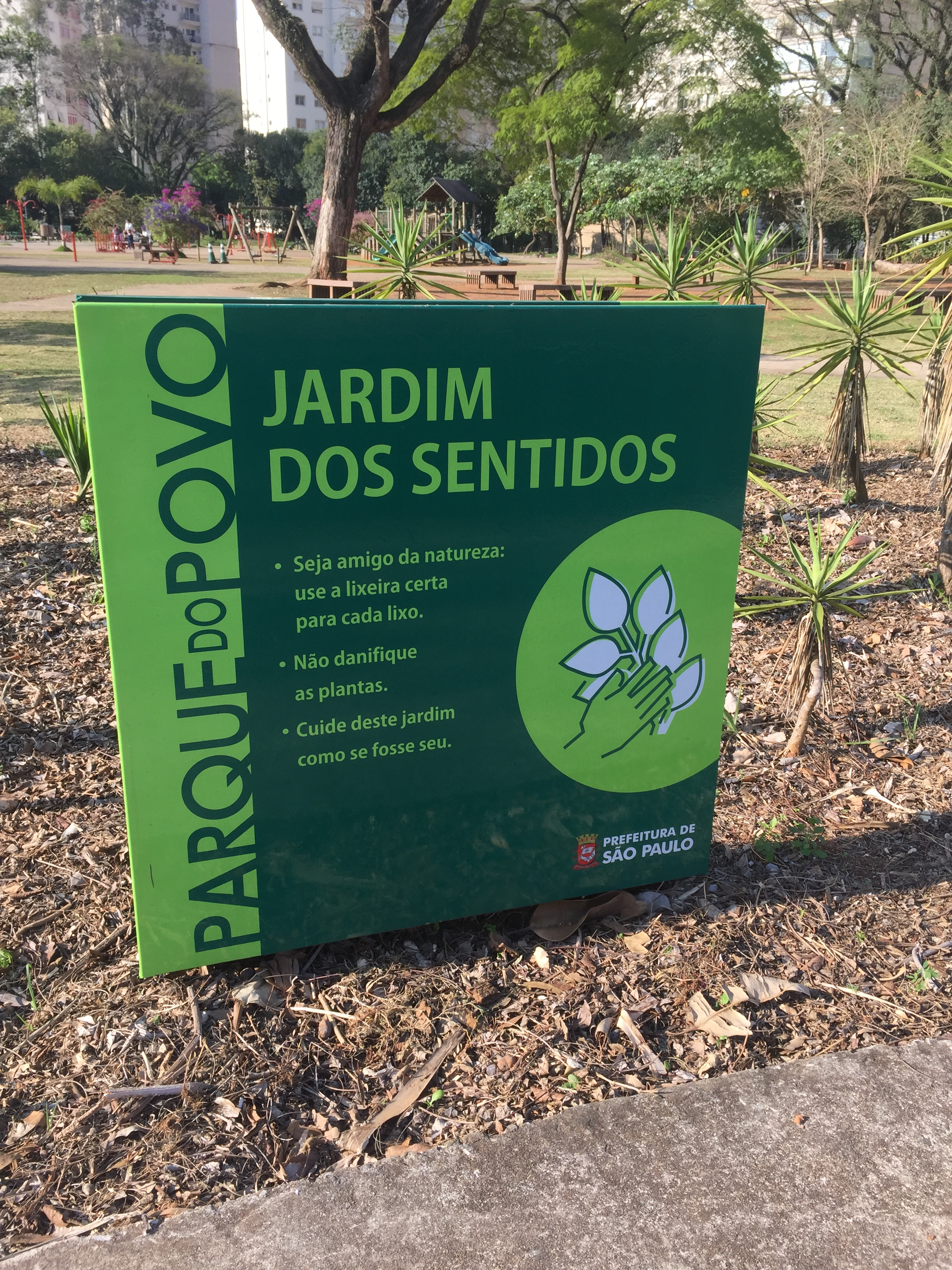 Placa de aviso Parque do Povo